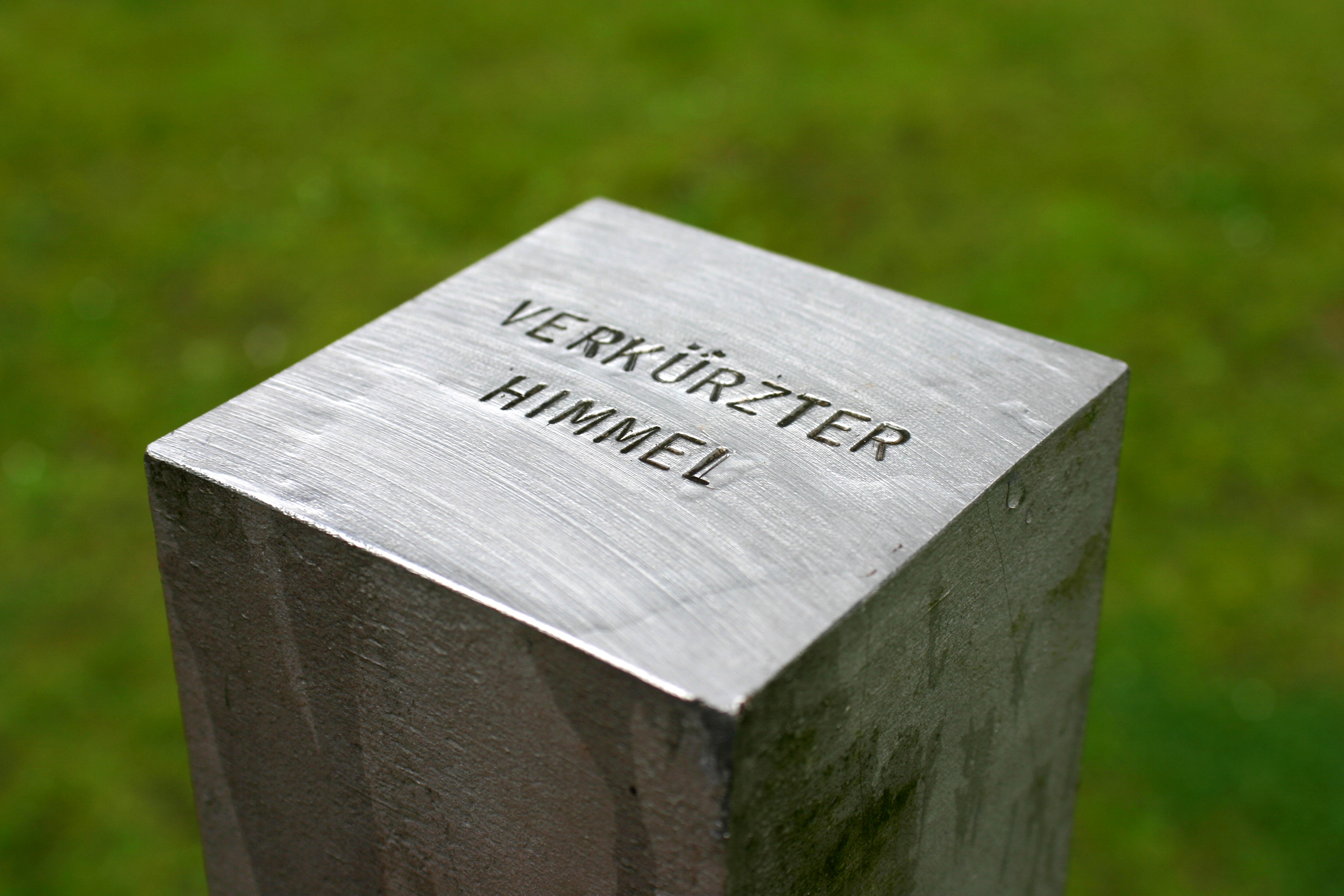 Giovanno Anselmo: Verkürzter Himmel 1987